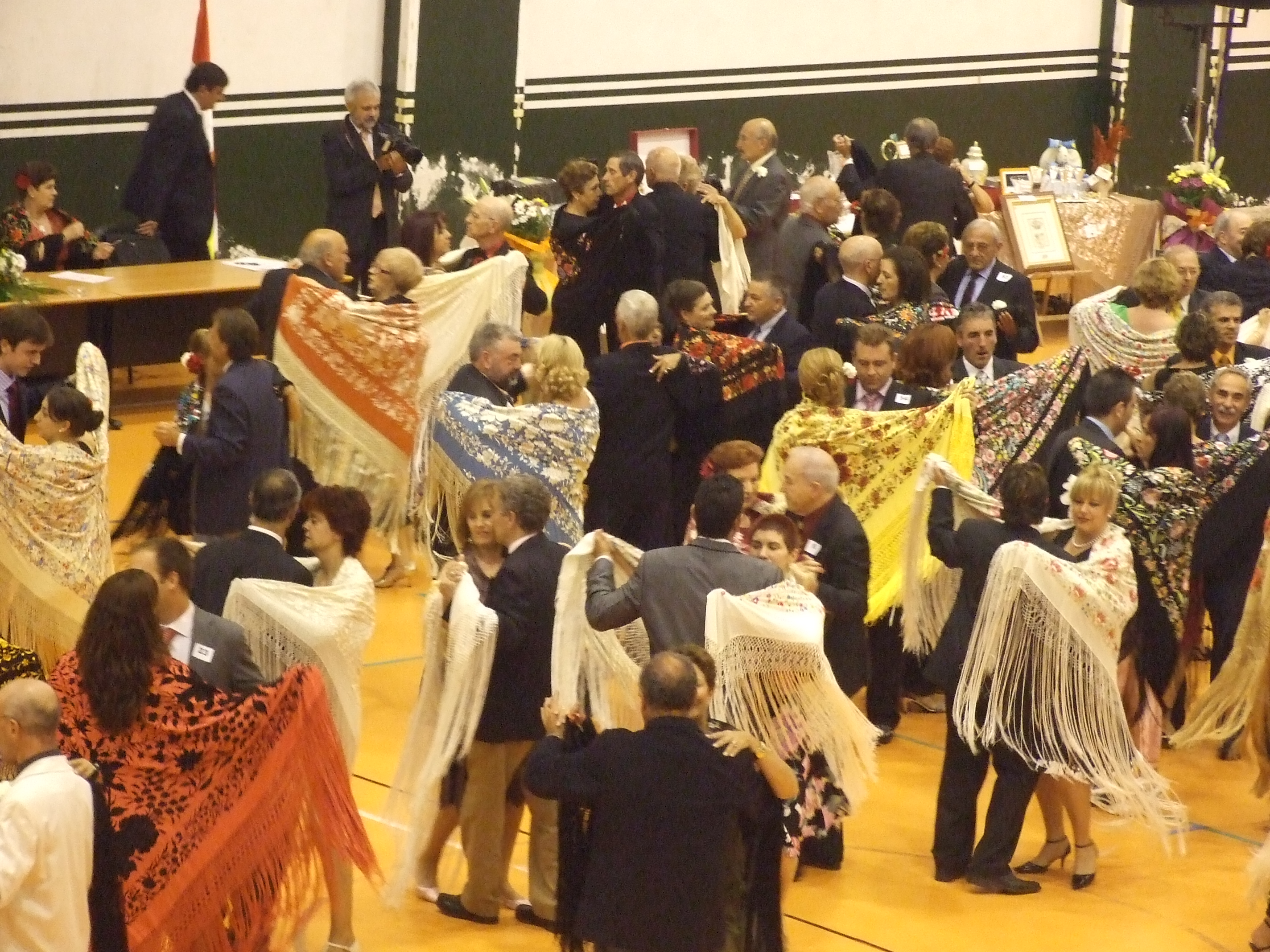 Verbena del Mantón en Ramales de la Victoria This is a photography of a Folklore festival in Spain (Wikidata id Q23657189).